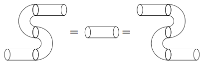 Frobenius algebra, Topologisk Kvantefeltteori: Slange relation